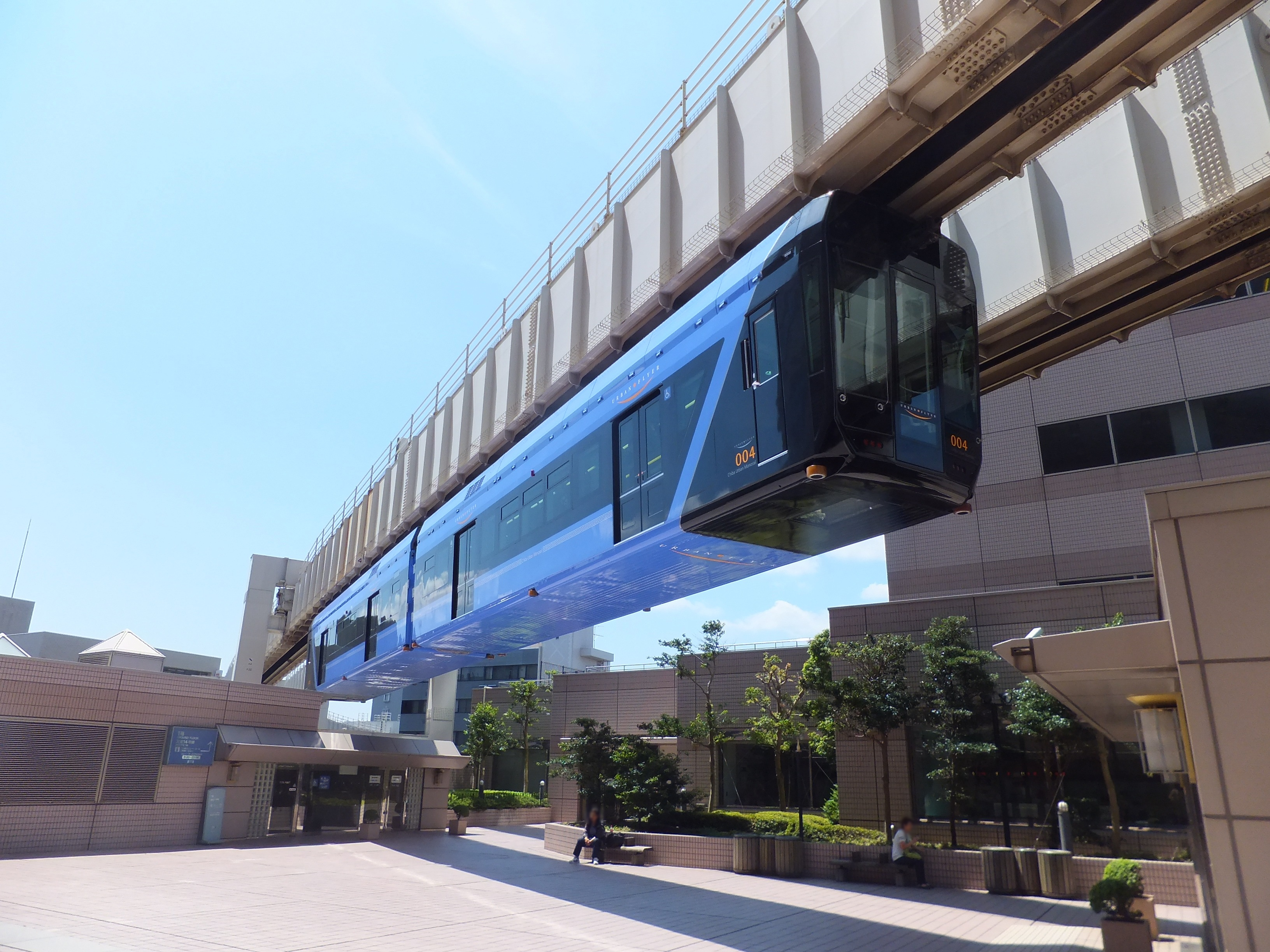 千葉都市モノレール0形「Urban Flyer Zero」